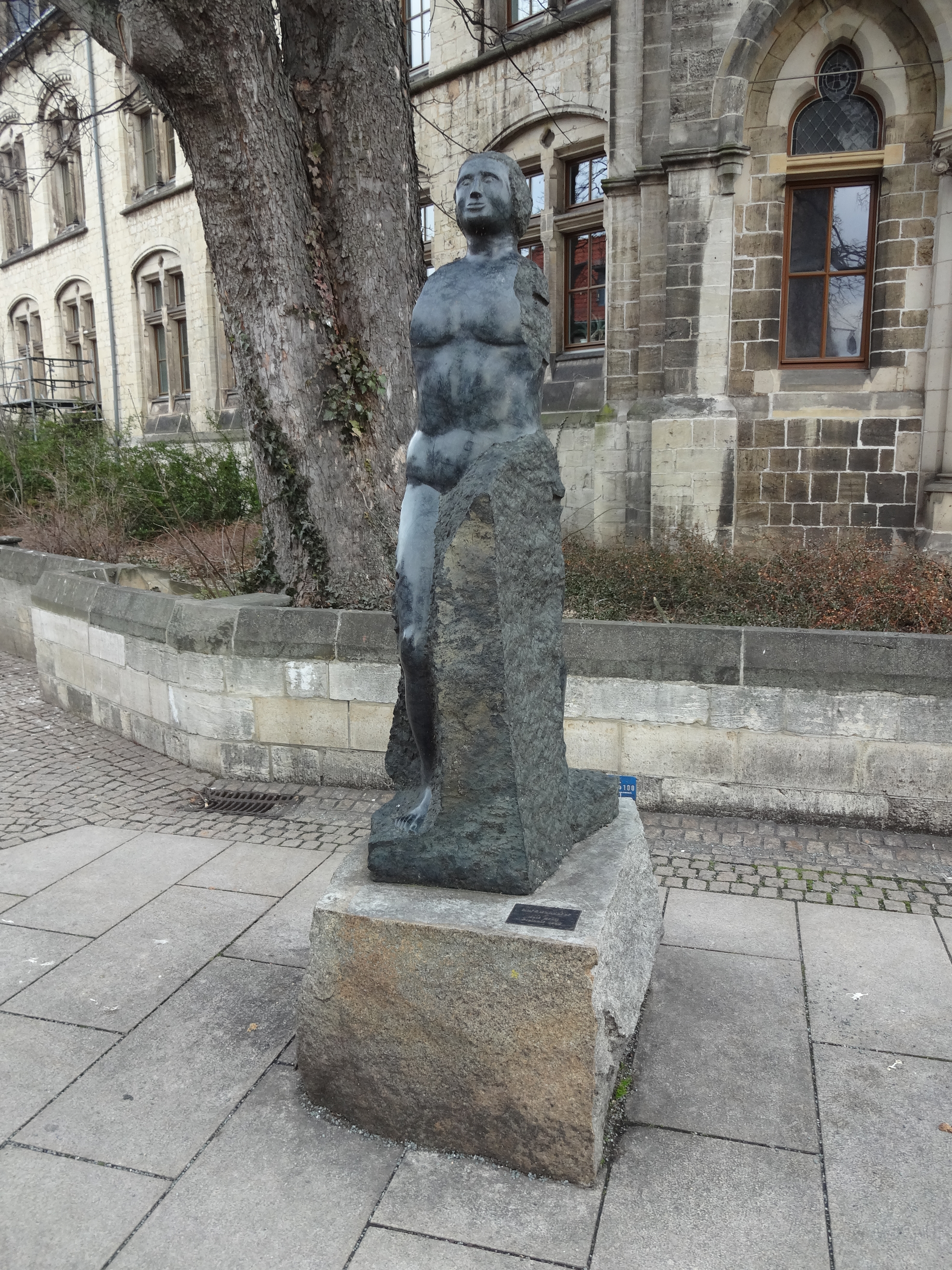 Plastik "Harzwanderer" von Wolf Bröll aus dem Jahr 1995 in der Westernstraße in Wernigerode